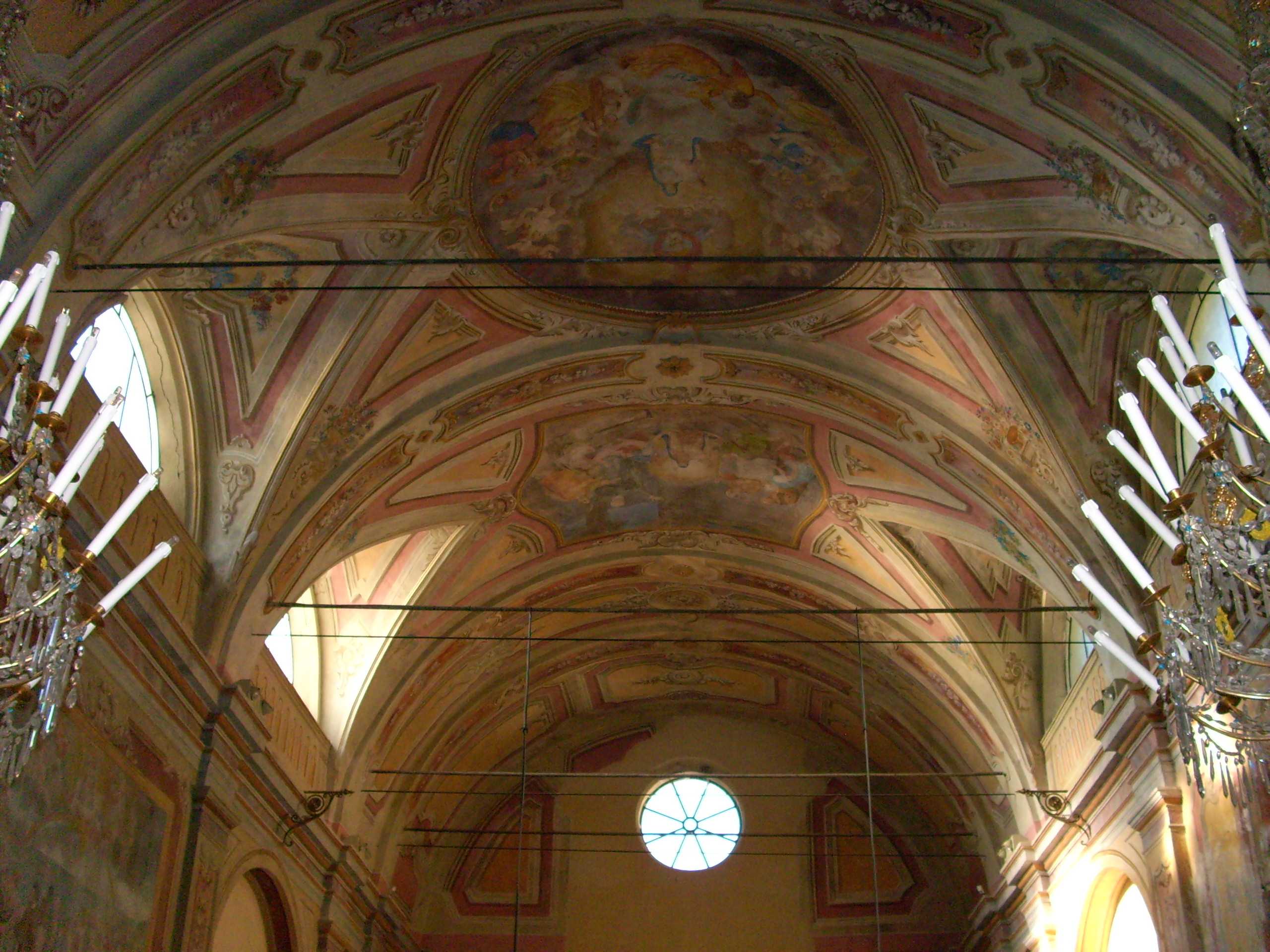 Santuario di Nostra Signora di Soviore, Monterosso al Mare, Liguria, Italia